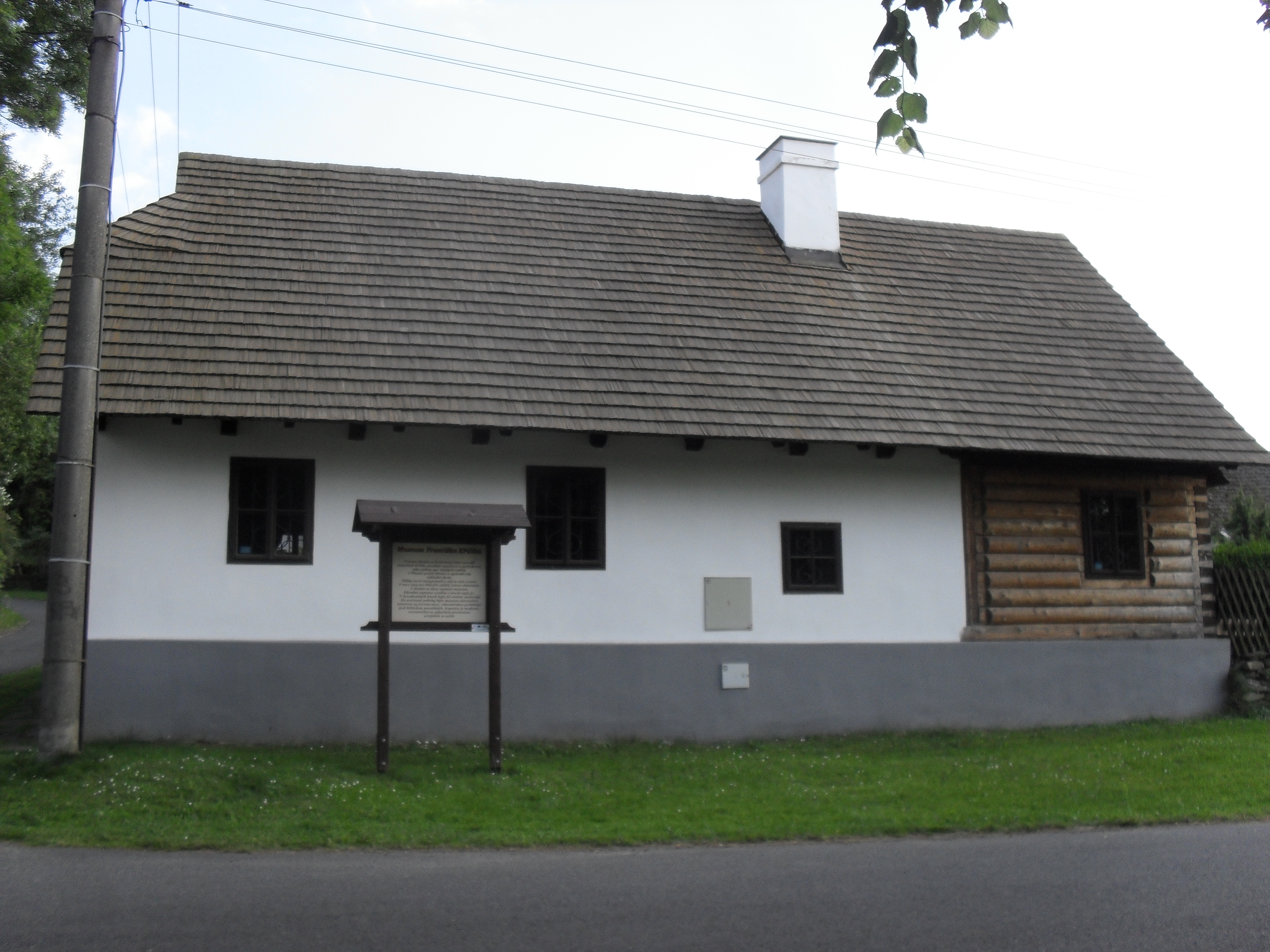 Fotografie Plánického rodného domu Františka Křižíka. Stavba dnes slouží jako museum.